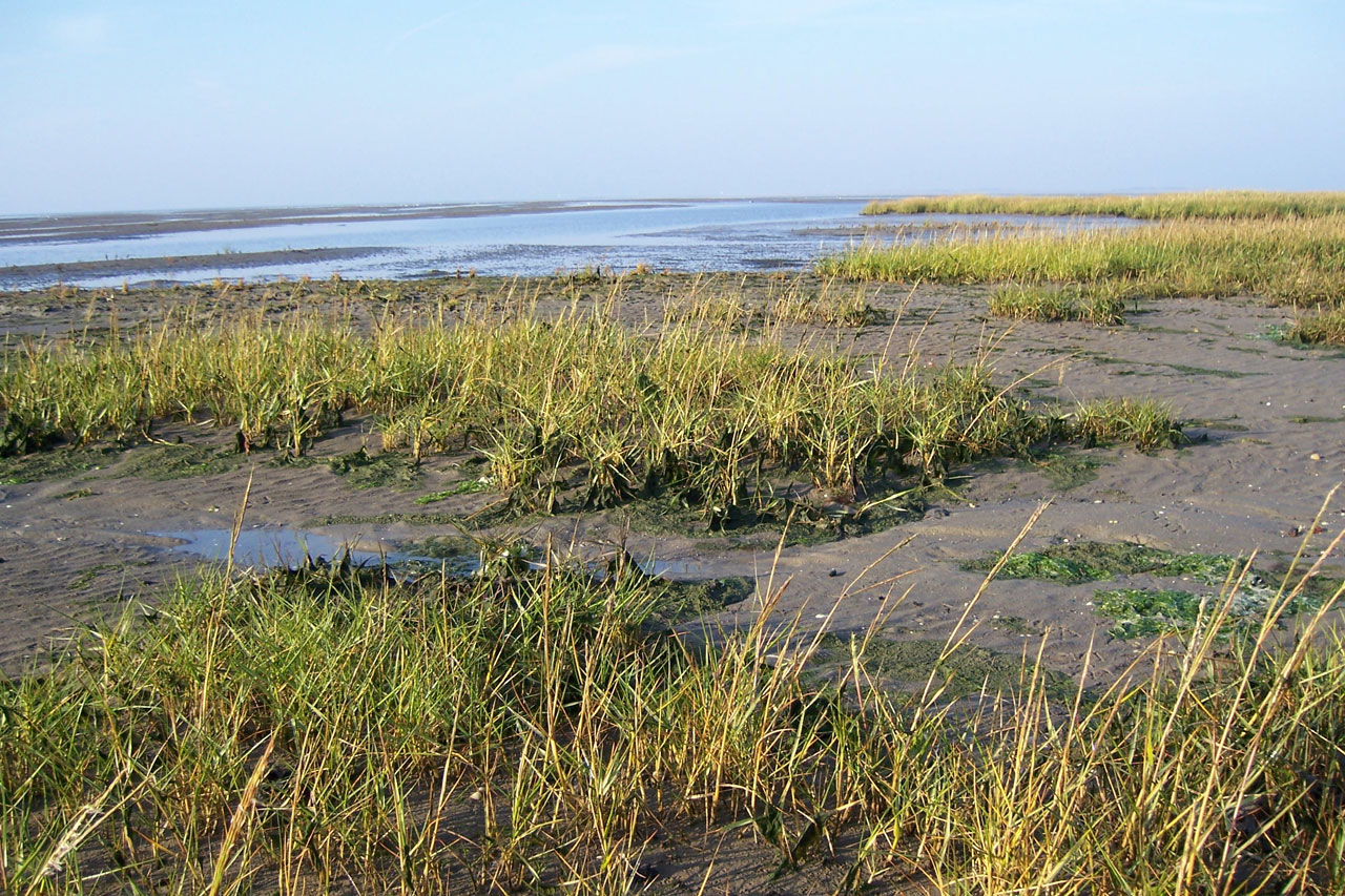 Nordseeinsel Spiekeroog. Salzwiese und Priel am Spiekerooger Inselwatt